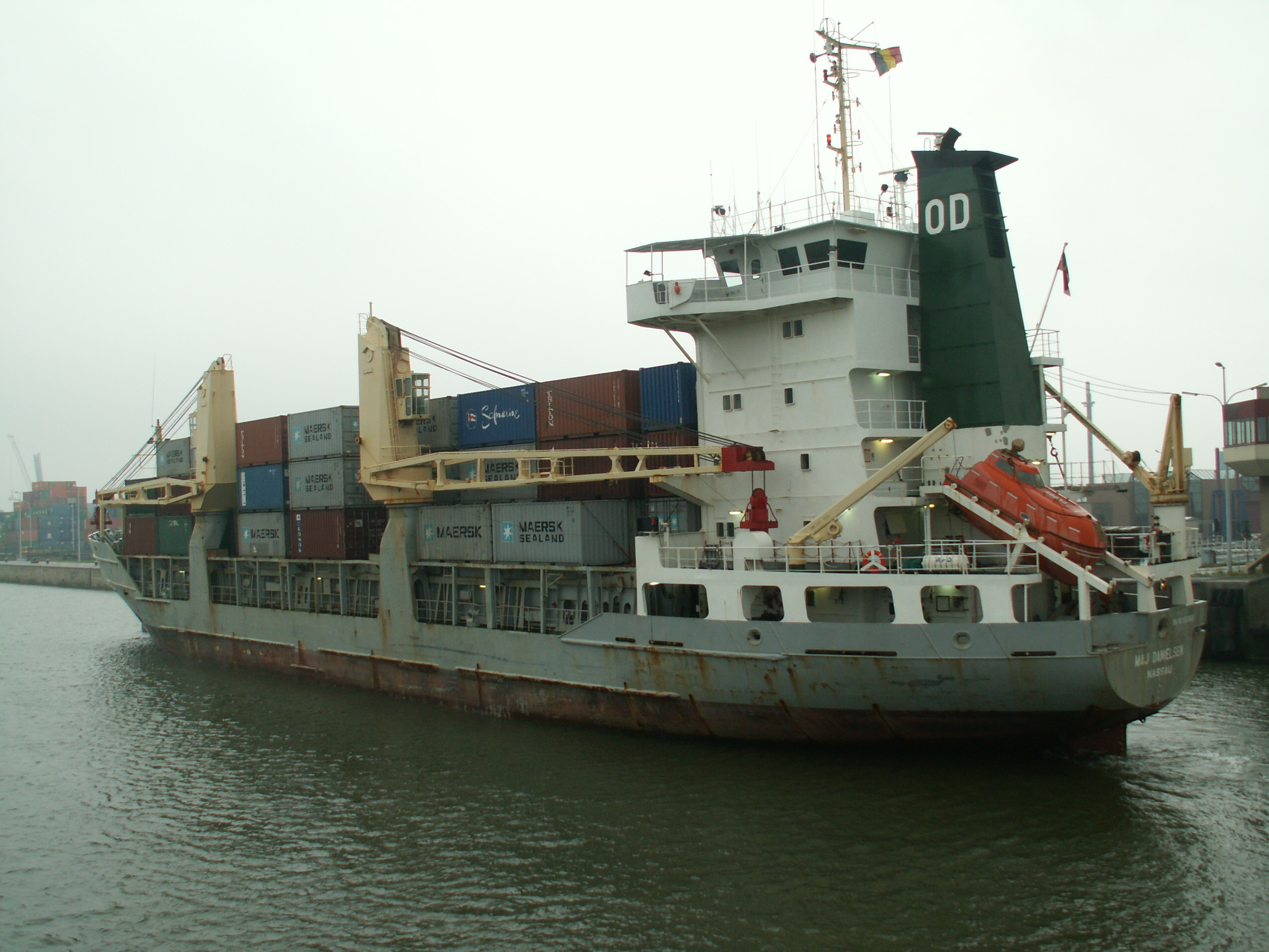 Maj Danielsen 27Jul05 Antw Port of Antwerp 27-Jul-2005.